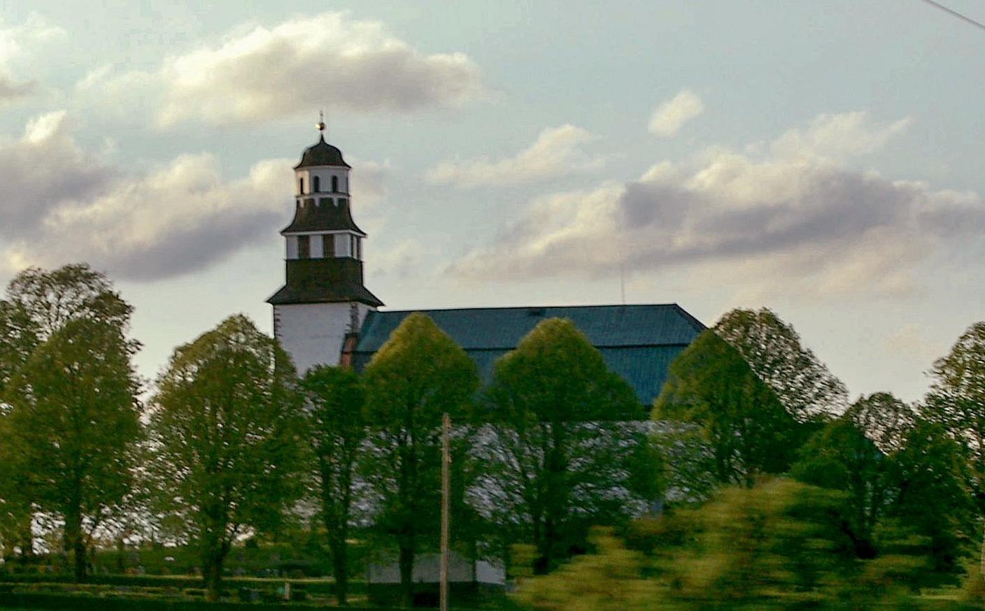 Stora Åby kyrka, Linköping Diocese